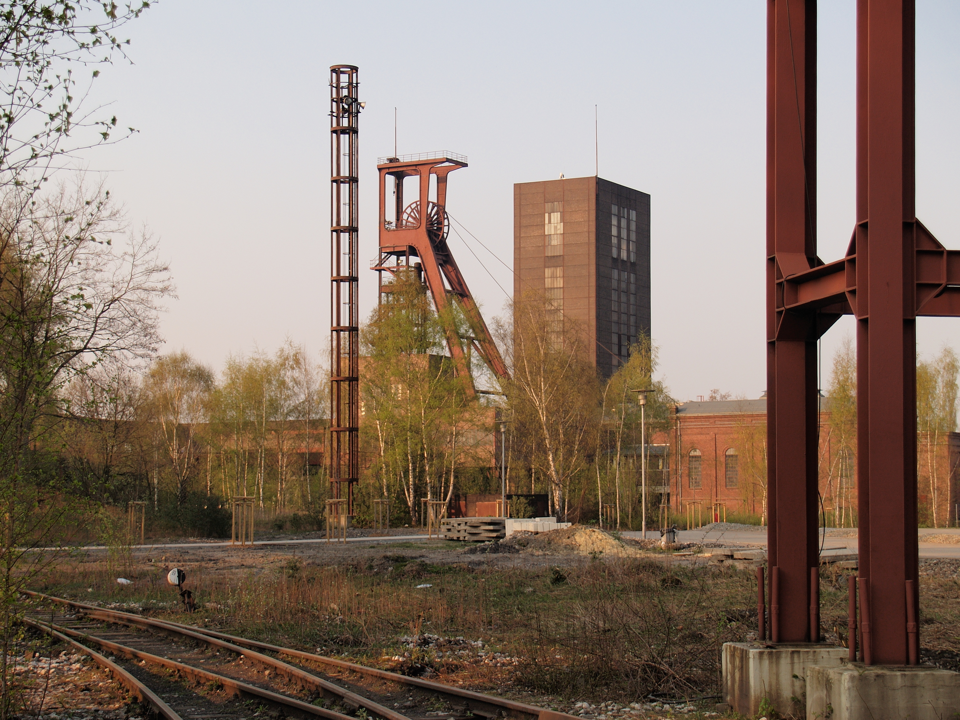 Schachtgerüst mit Förderseilen auf der Zeche Zollverein in Essen